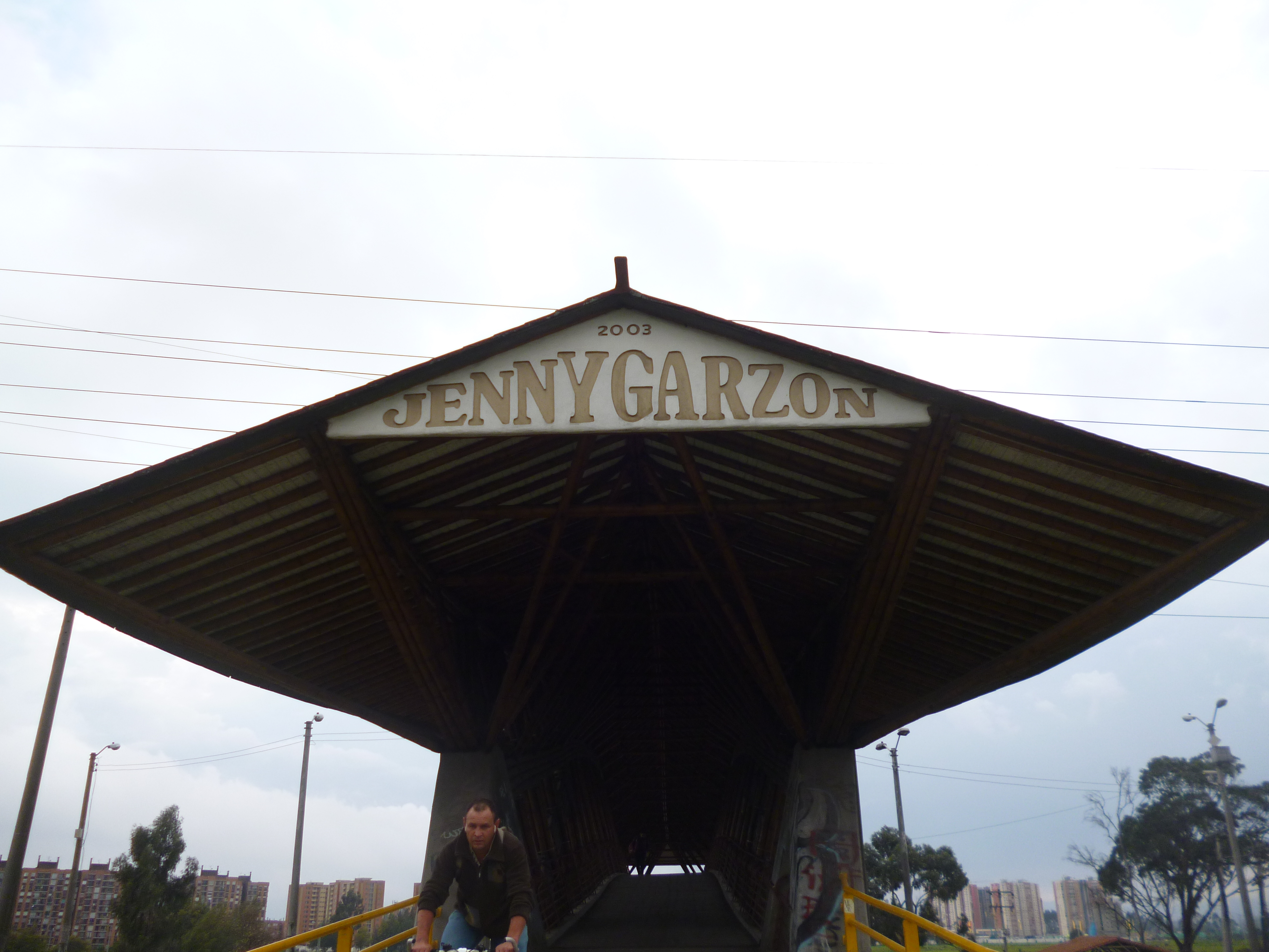 Nombre del puente.